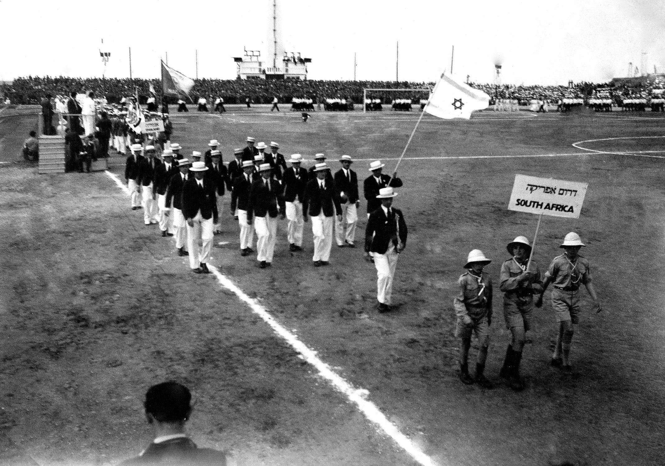 אוסף דוד עופר - המכביה השניה ; פריט מספר 26